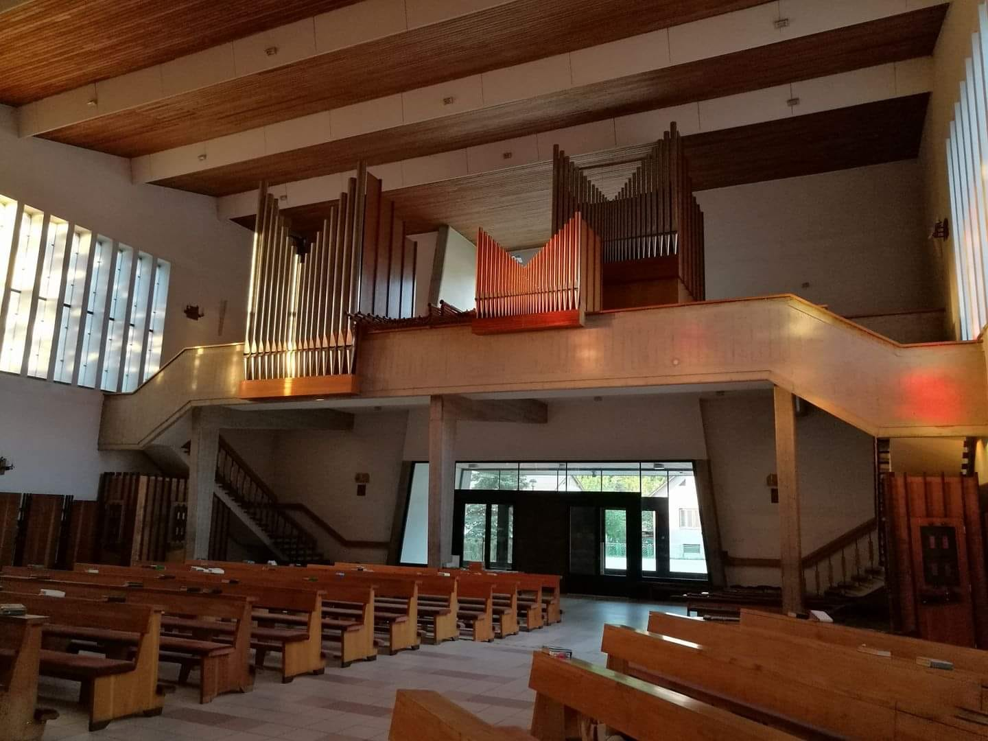 Organ vo farskom kostole pri pohľade z kostola, po vyčistení.